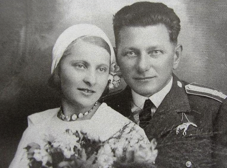 Fotografie Jolany Kašparové a Bohuslava Kašpara (Nejspíše svatební foto z roku 1932) Bohuslav Kašpar (18. září 1895 České Meziříčí - 15. ledna 1945, Brandenburg) byl rakousko-uherský (vojenský) pilot - jeden z průkopníků a zakladatelů československého vojenského letectví. Je držitelem jednoho světového a několika národních leteckých rekordů. Jeho činnost byla oceněna i prezidentem Tomášem Garriguem Masarykem, od něhož Bohuslav Kašpar obdržel (jako upomínkový dar) kapesní hodinky s věnováním. Za protektorátu se spolu se svojí manželkou Jolanou Kašparovou (* 22. listopadu 1909 v Nitře - 15. března 1944 umučena v Osvětimi) zapojil do protiněmeckého odboje. Za svoji odvahu a vlastenectví oba zaplatili životem. Jolana Kašparová (rozená Eichlerová) (* 22. listopadu 1909 v Nitře - 15. března 1944 umučena v Osvětimi) manželka vojenského pilota v tzv. smíšeném manželství, bytem Dobruška J. Drejska 625. Dne 22. února 1943 byla zatčena gestapem za činnost v protifašistickém odboji. Nejprve byla vězněna ve věznici gestapa v Hradci Králové. Dne 17. dubna 1943 byla z věznice gestapa v Hradci Králové deportována přes sběrný tábor do koncentračního tábora Osvětim. Jolana Kašparová byla před deportací (v rámci nacistického řešení židovské otázky) uchráněna "korekcí" v seznamů osob určených k deportaci. Tuto "úpravu" provedl Emil Dostál - přítel Bohuslava Kašpara. Prezident Československé republiky - Dr. Edvard Beneš, udělil dne 15. prosince 1945 (in memoriam) Jolaně Kašparové Československý válečný kříž 1939 (Matriční číslo 14 028).